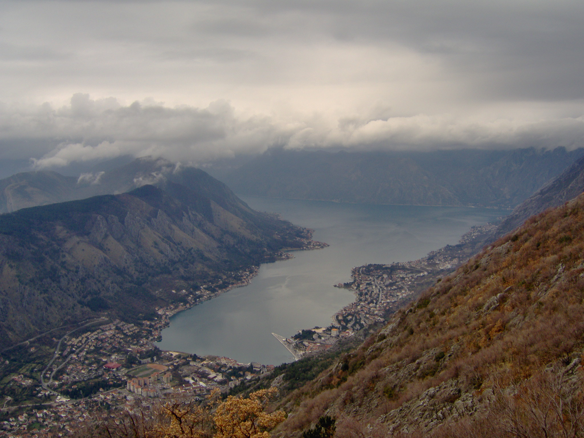 Bild över Kotor, Kotorbukten, februari 2007